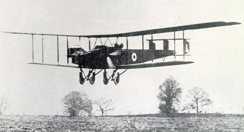 Handley Page O/400 lands at RAF Andover, November en:1918